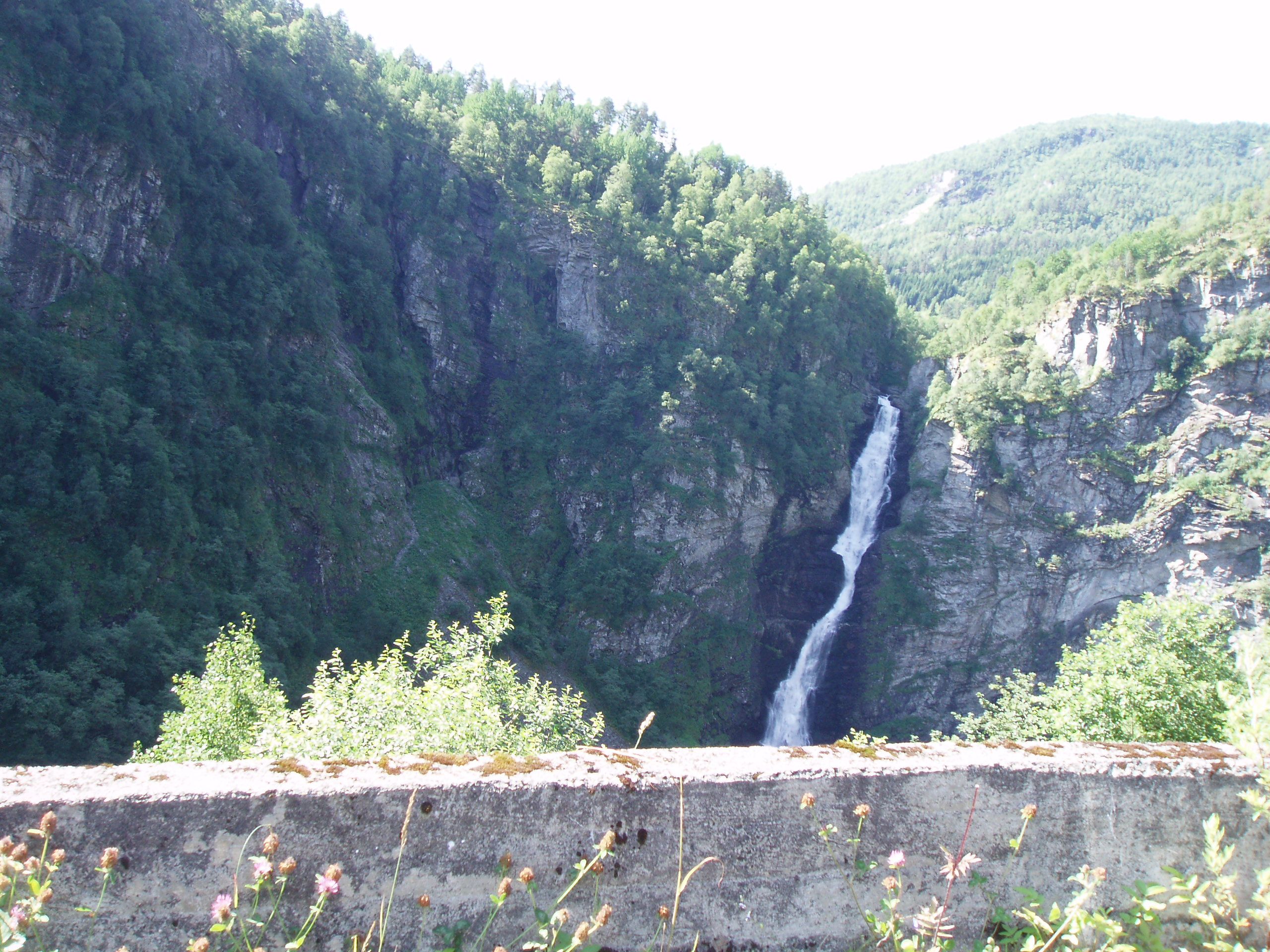 Stalheimsfossen at Stalheim in Voss, Norway.